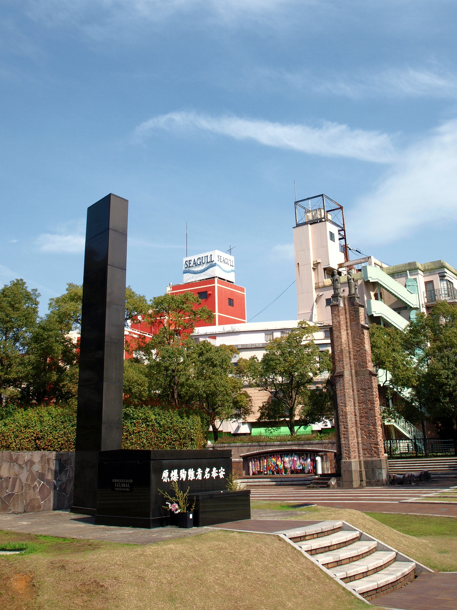 長崎市・平和公園の原爆落下中心地地区にある「原爆落下中心地碑」（左）と 「旧浦上天主堂遺壁 」。2009年3月撮影